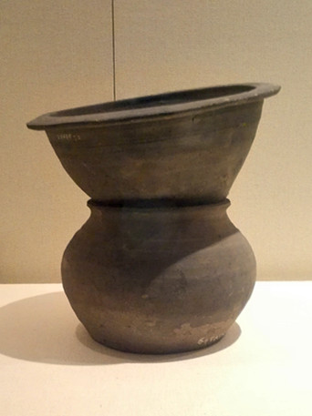 陶釜甑，北朝（420-589），吐鲁番哈拉和卓墓葬出土